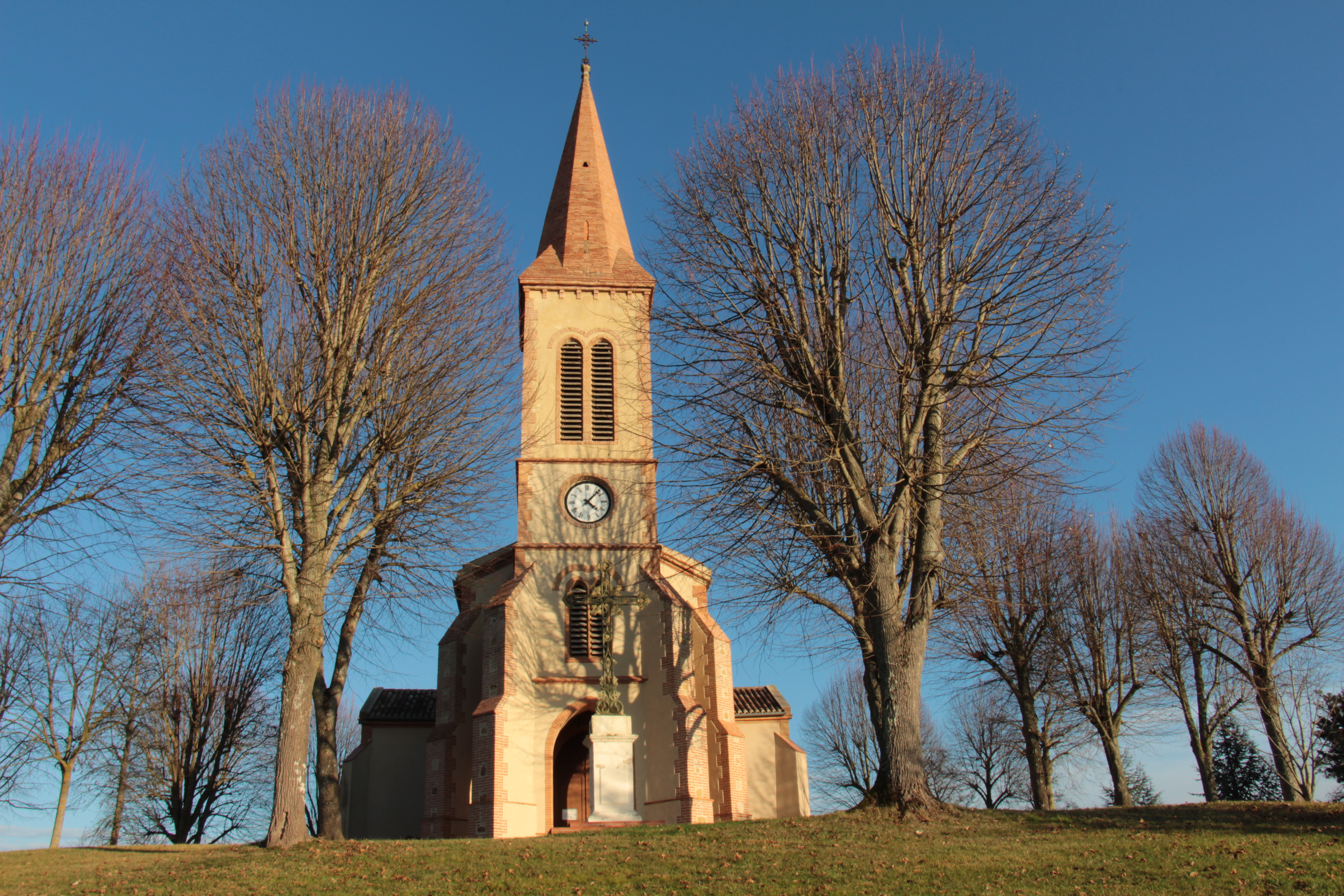 Eglise Espaon Gers